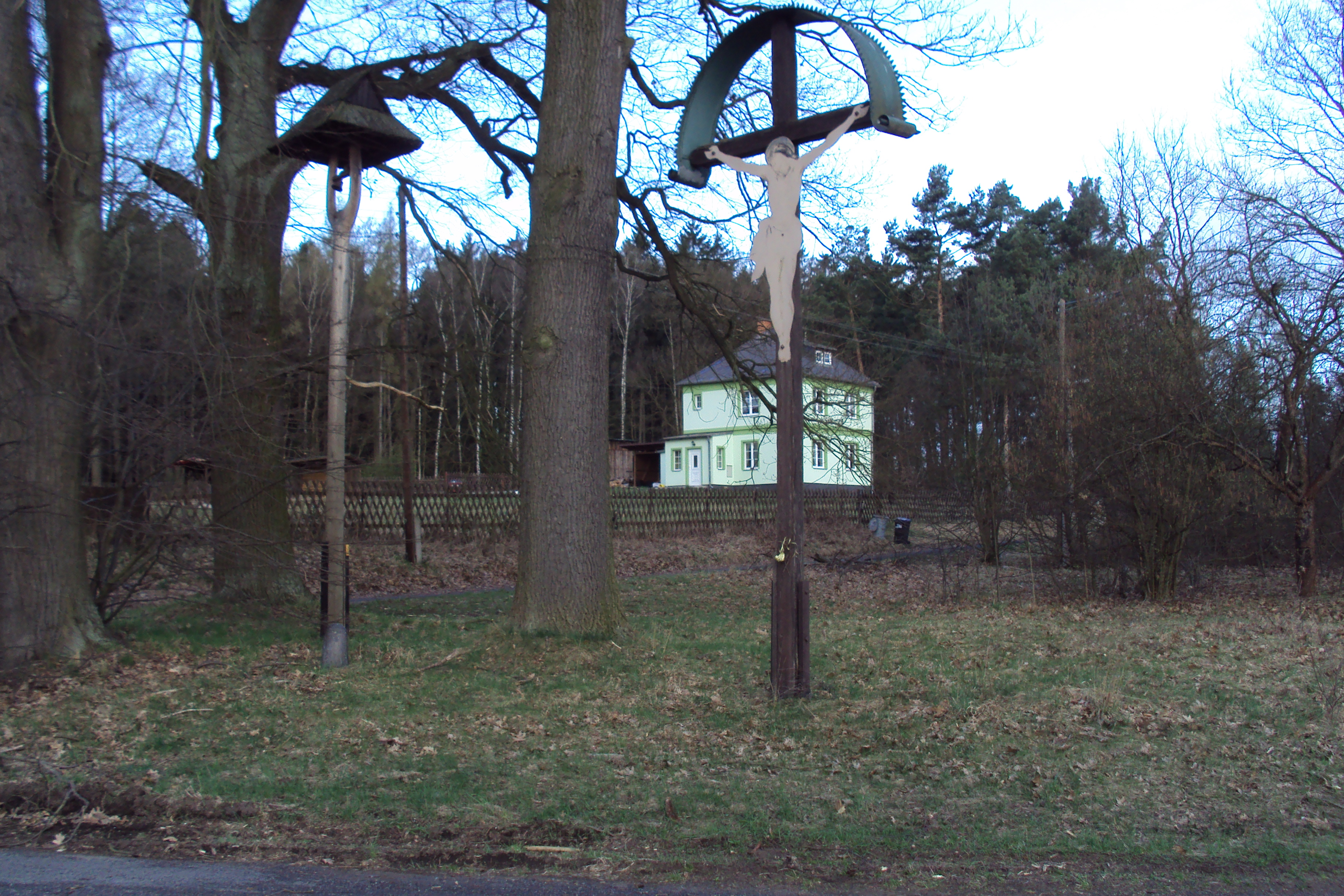 Vesnička Boreček od silnice 270 z Mimoně na Hradčany, okres Česká Lípa